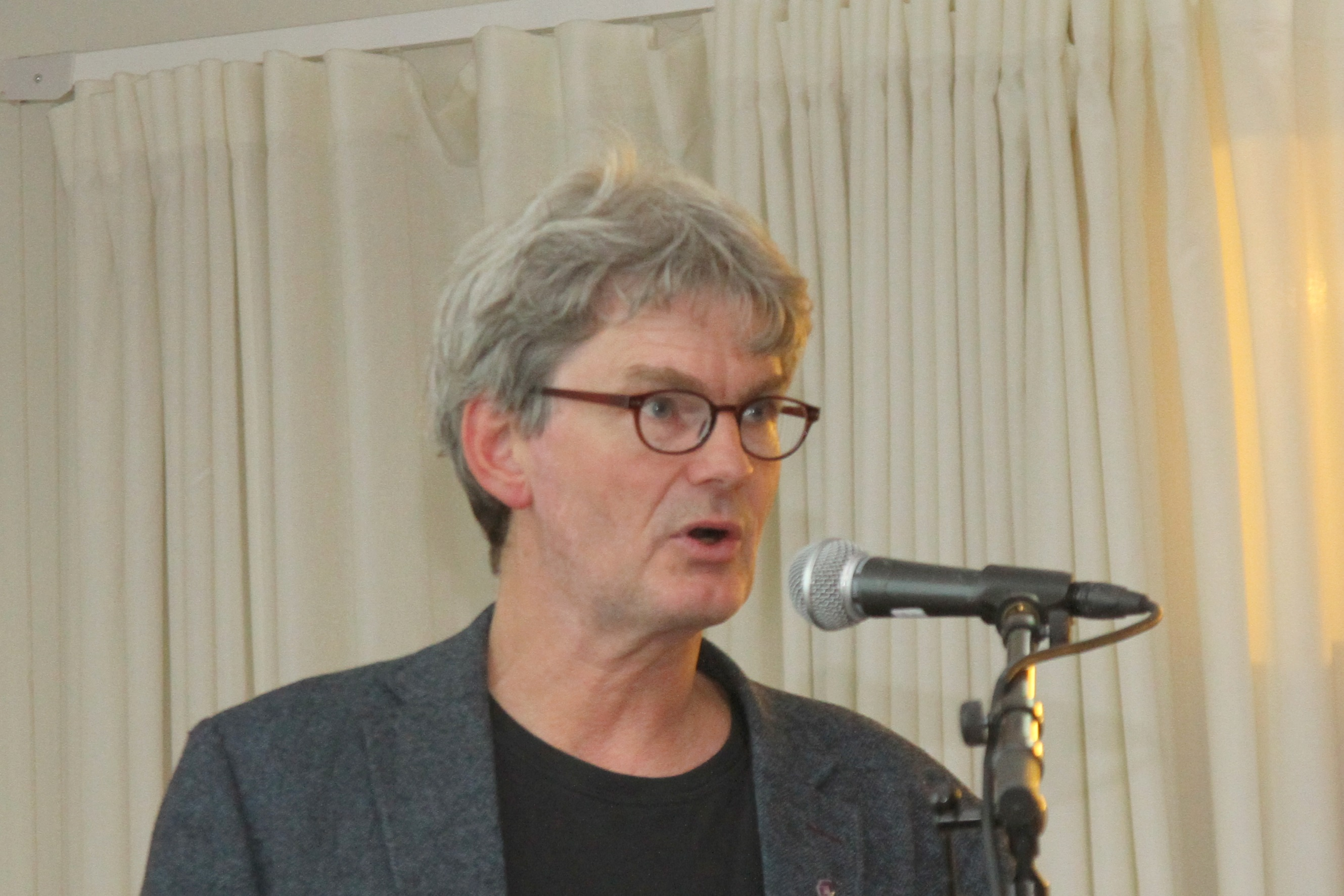 Ole Bjørn Rekdal, norsk sosialantropolog. Bildet er tatt under et Wikitreff i Oslo der Rekdal holdt et foredrag om akademisk referansebruk.